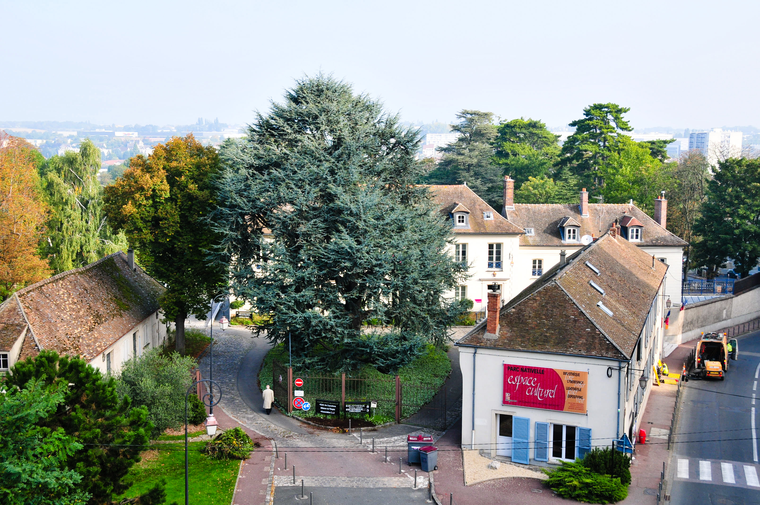 Longjumeau